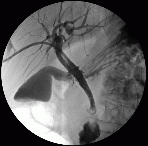 Perkutan transhepatische Cholangiographie Albertinen-Krankenhaus Hamburg II.Medizin 2006